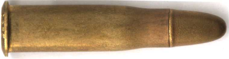 Italijanski naboj za puško Vetterli-Vitali.